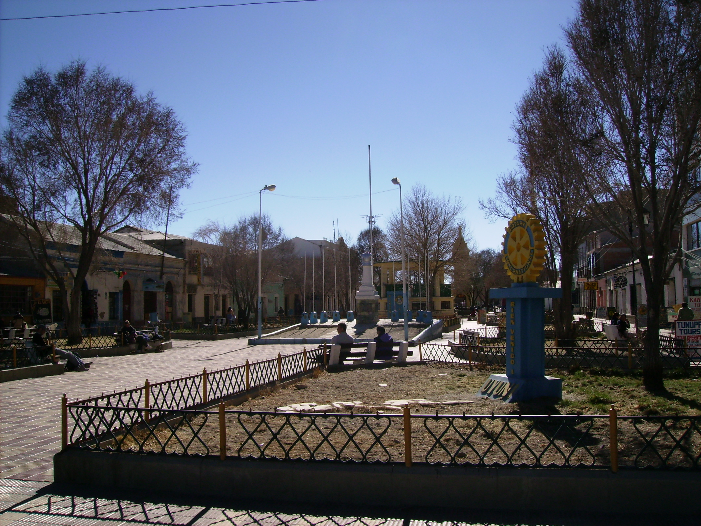 Praça de Uyuni, Bolivia